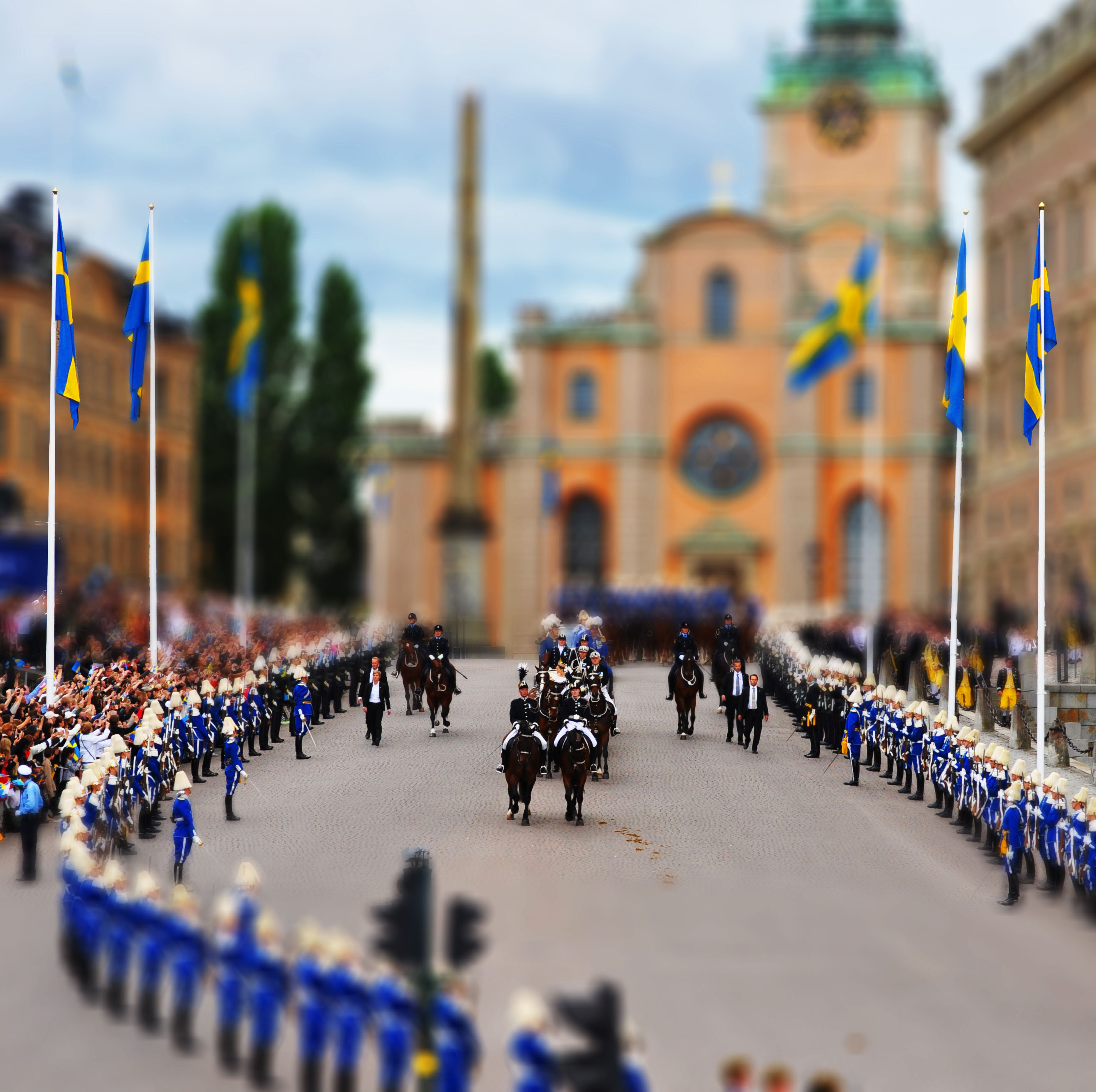 guards at slottsbacken in fake tilt shift